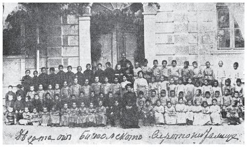 Битолско сиропиталище.